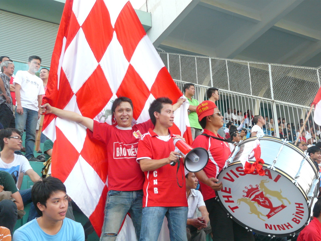 Cổ động viên Ninh Bình cổ vũ cho Câu lạc bộ bóng đá Xi măng The Vissai Ninh Bình trên sân Thống Nhất